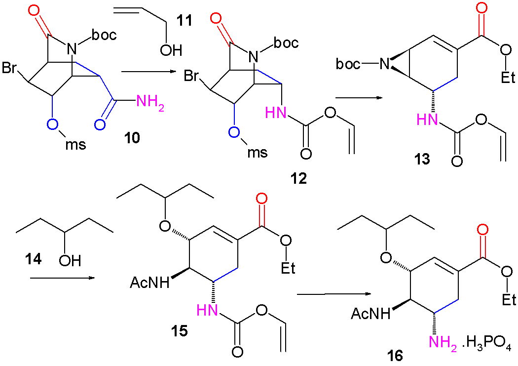 Synthesis Oseltamivir Fukuyama PartII